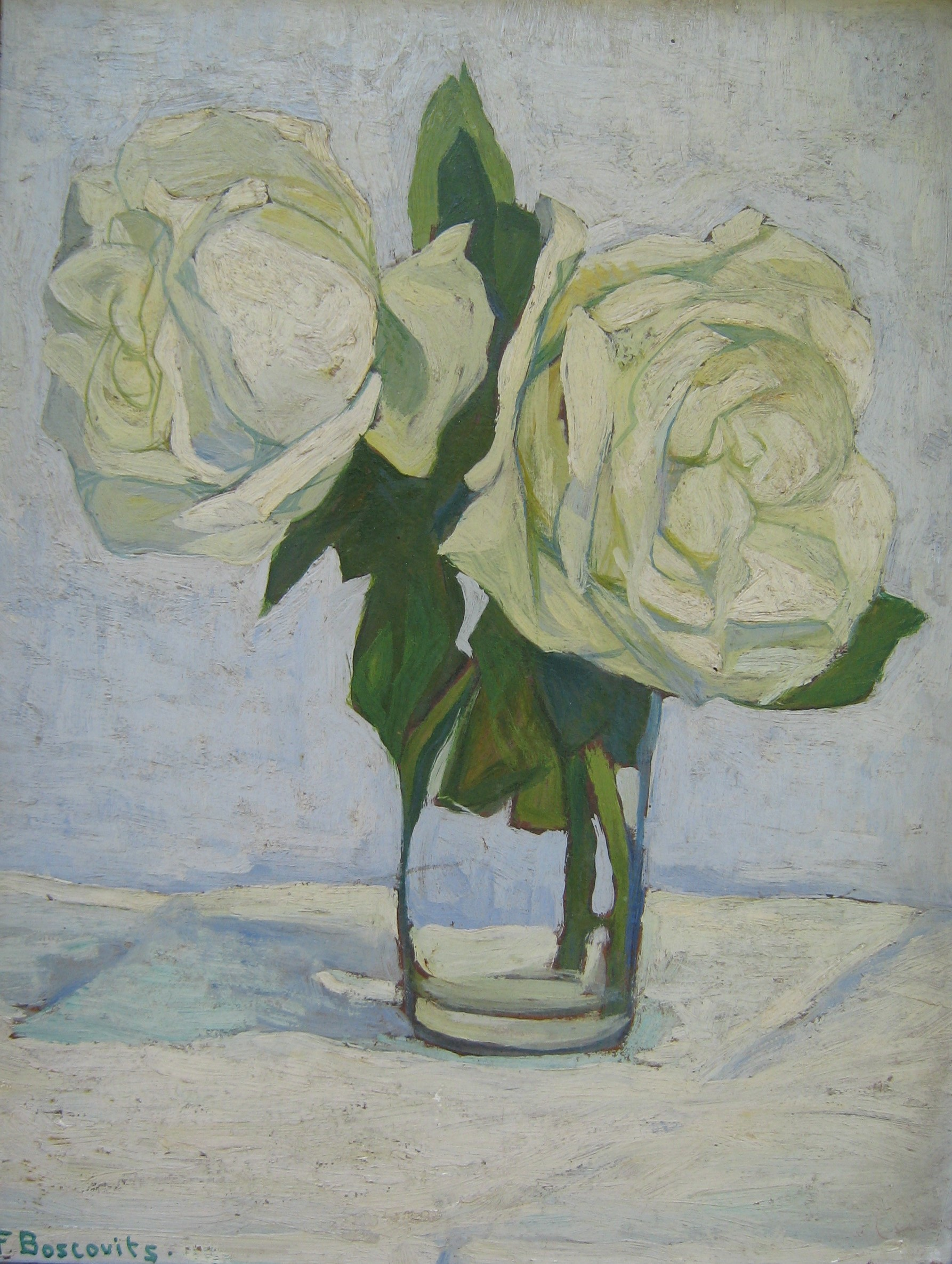 Öl auf Karton 35x26 cm